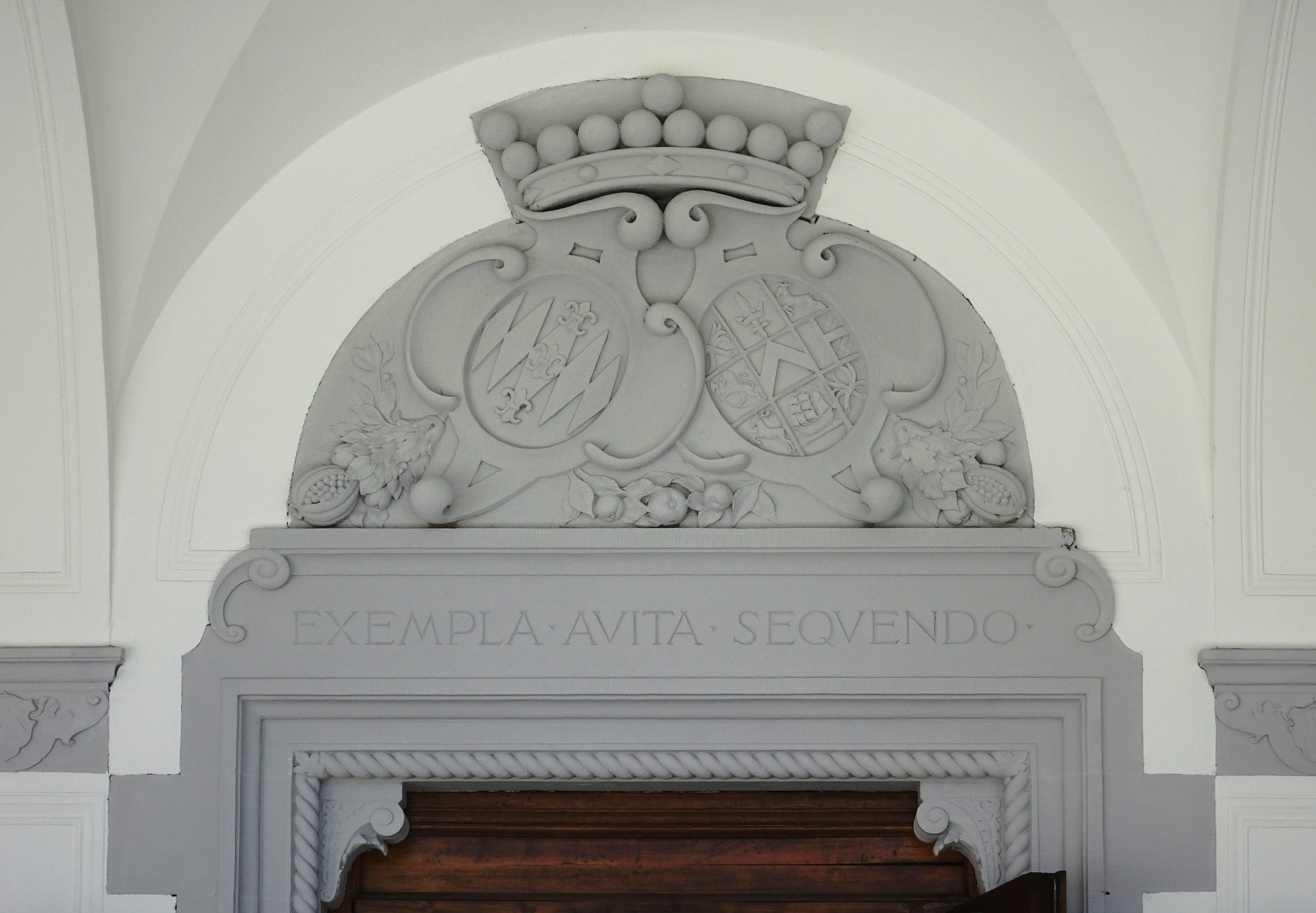 Lejondals slott, de Geers och Sparres vapensköldar och valspråk: Exempla Avita Seqvendo (Genom att följa förfadernes exempel).